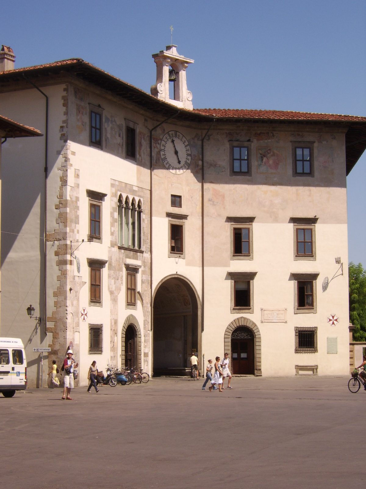 Pise, palais de l'Horloge.